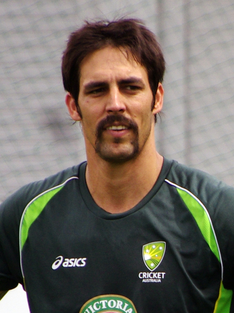 MITCHELL JOHNSON